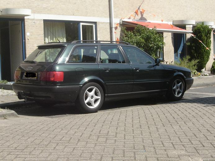 Audi 80 Avant 2.0 B4, uit 1994